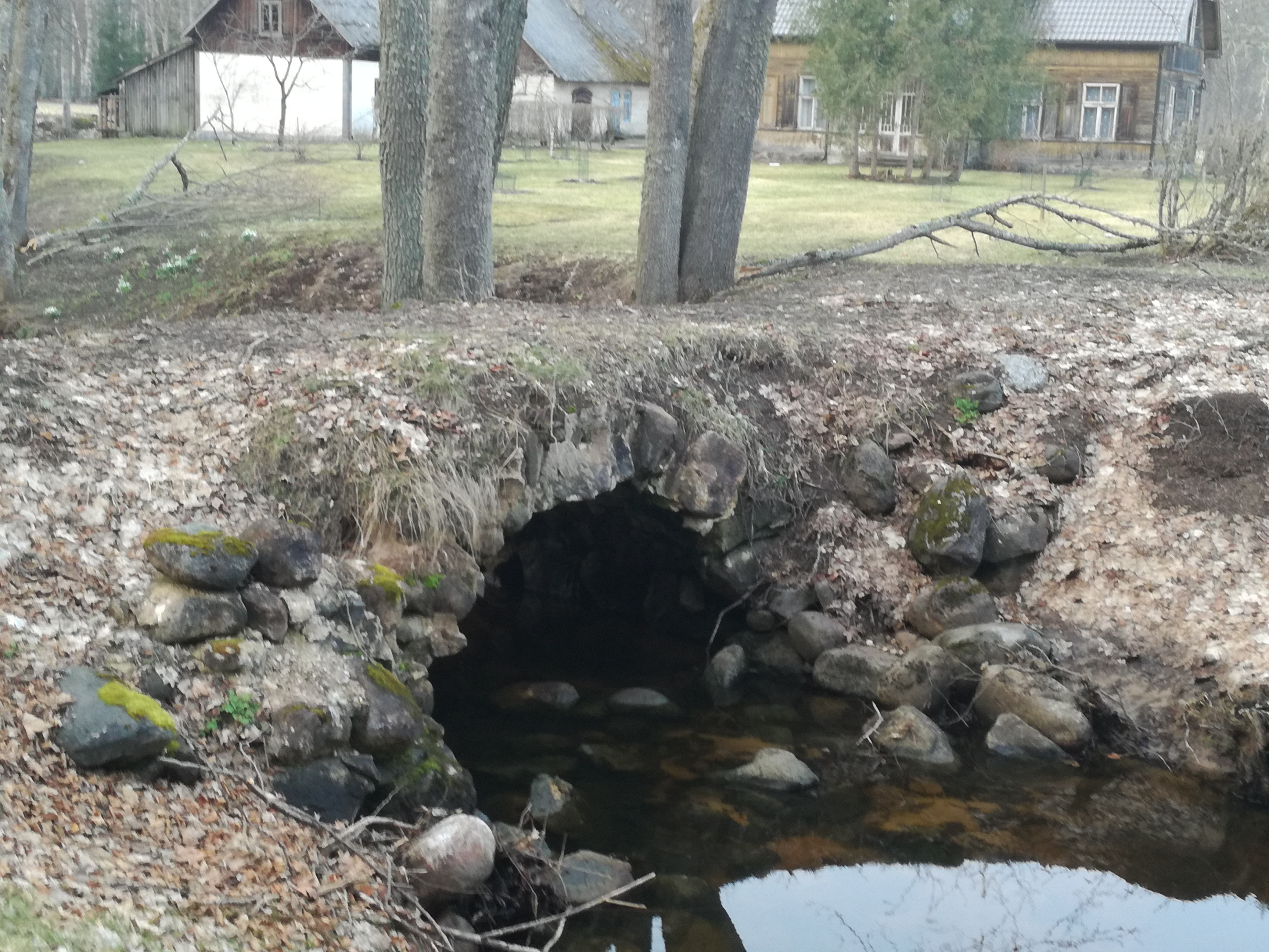 Kalnupe pie Ezermuižas un pie autoceļa V1441